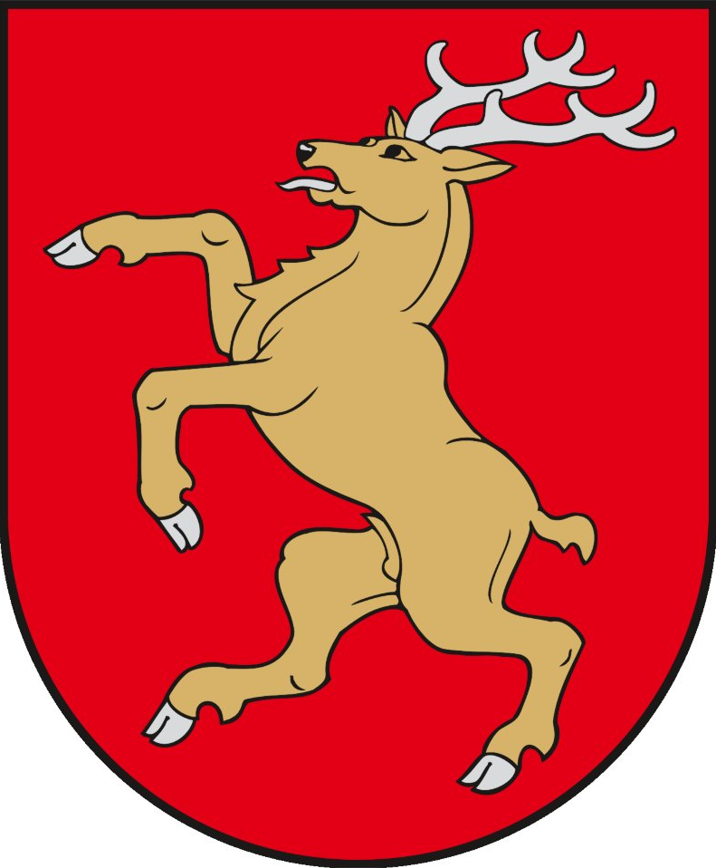 Dubičių herbas